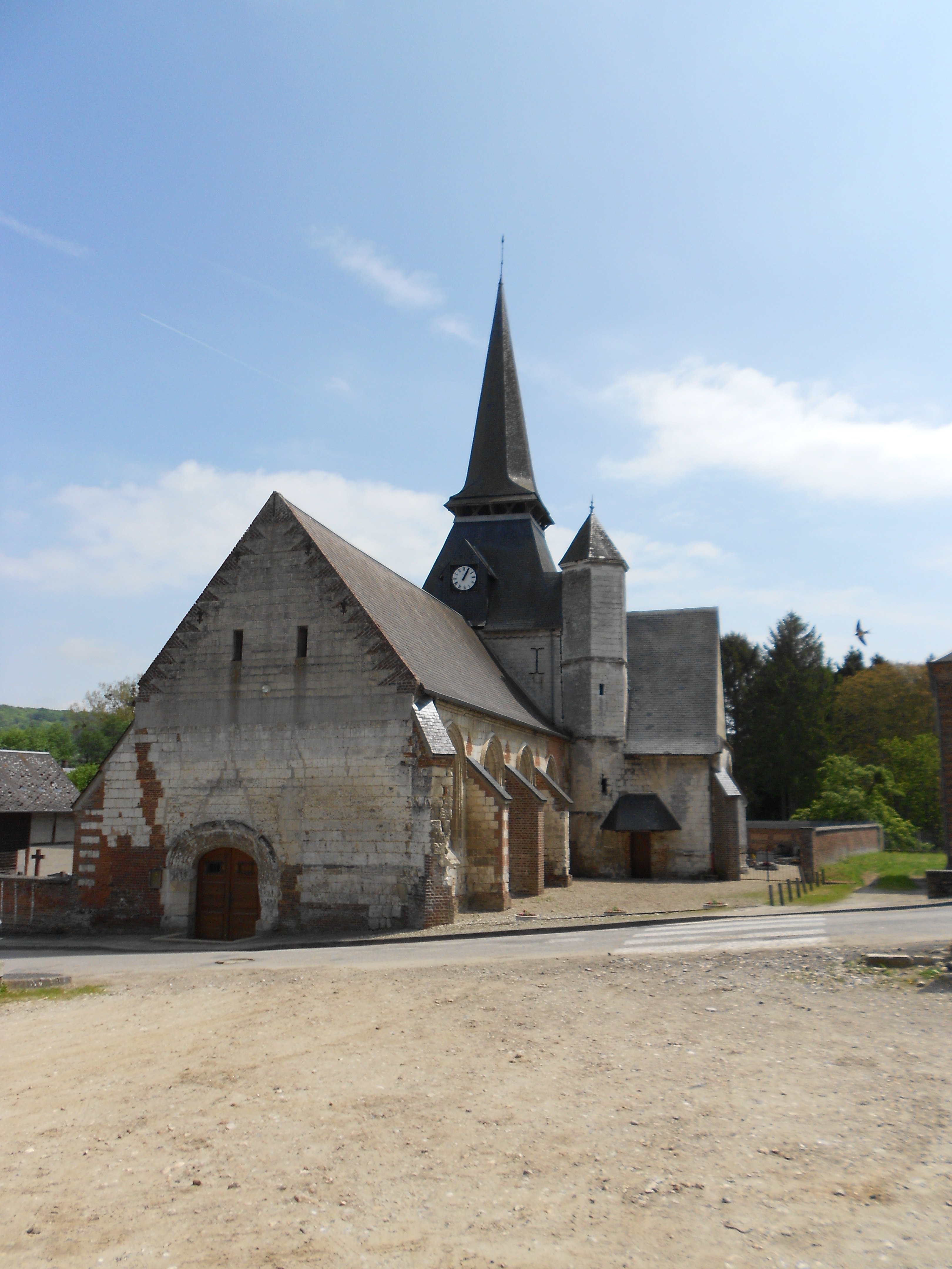 Eglise Saint-Martin de Monchaux-Soreng, Seine Maritime.